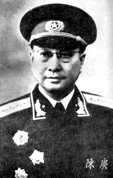 陈赓大将，授勋照